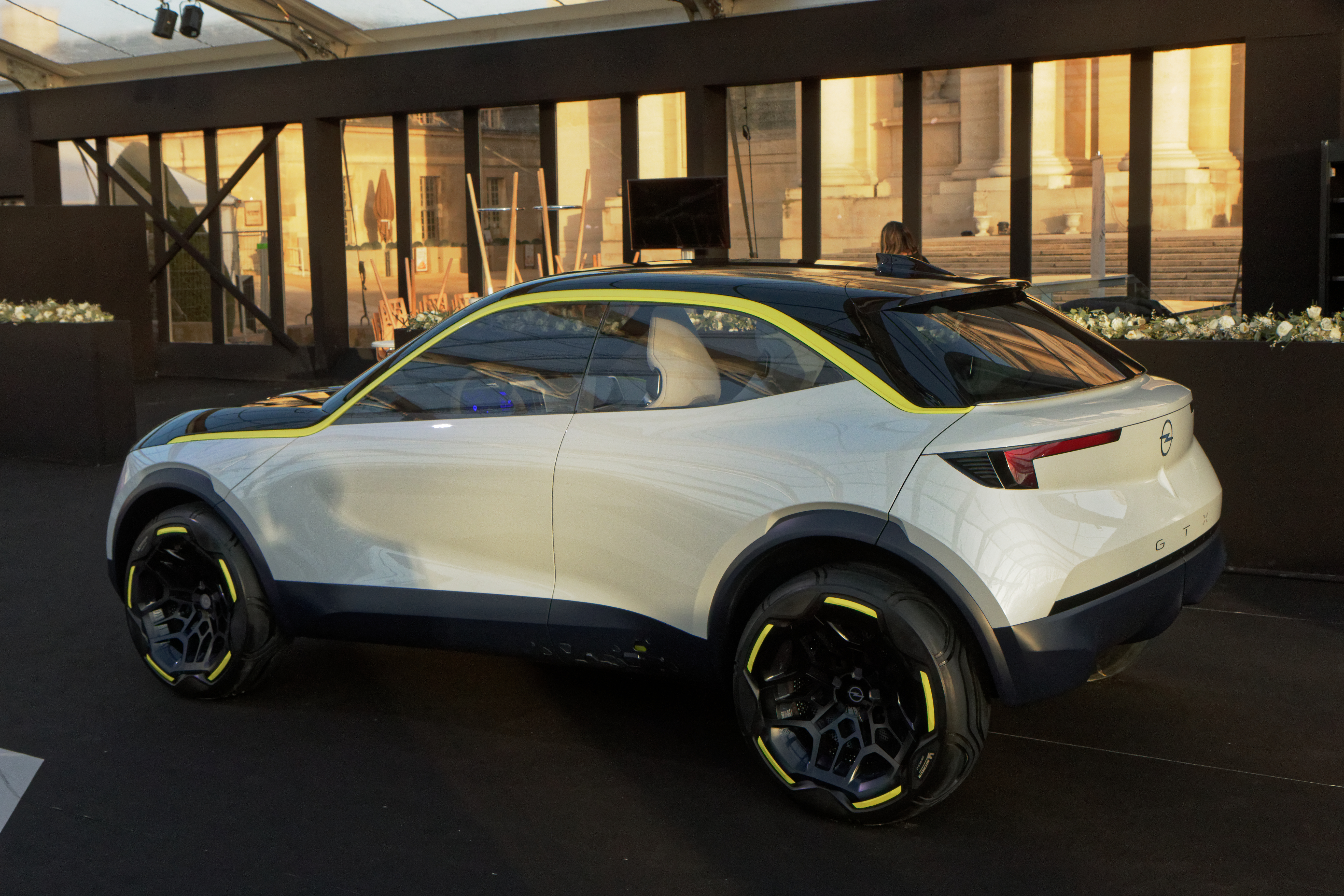 Une Opel GT X exposée lors du festival automobile international 2020